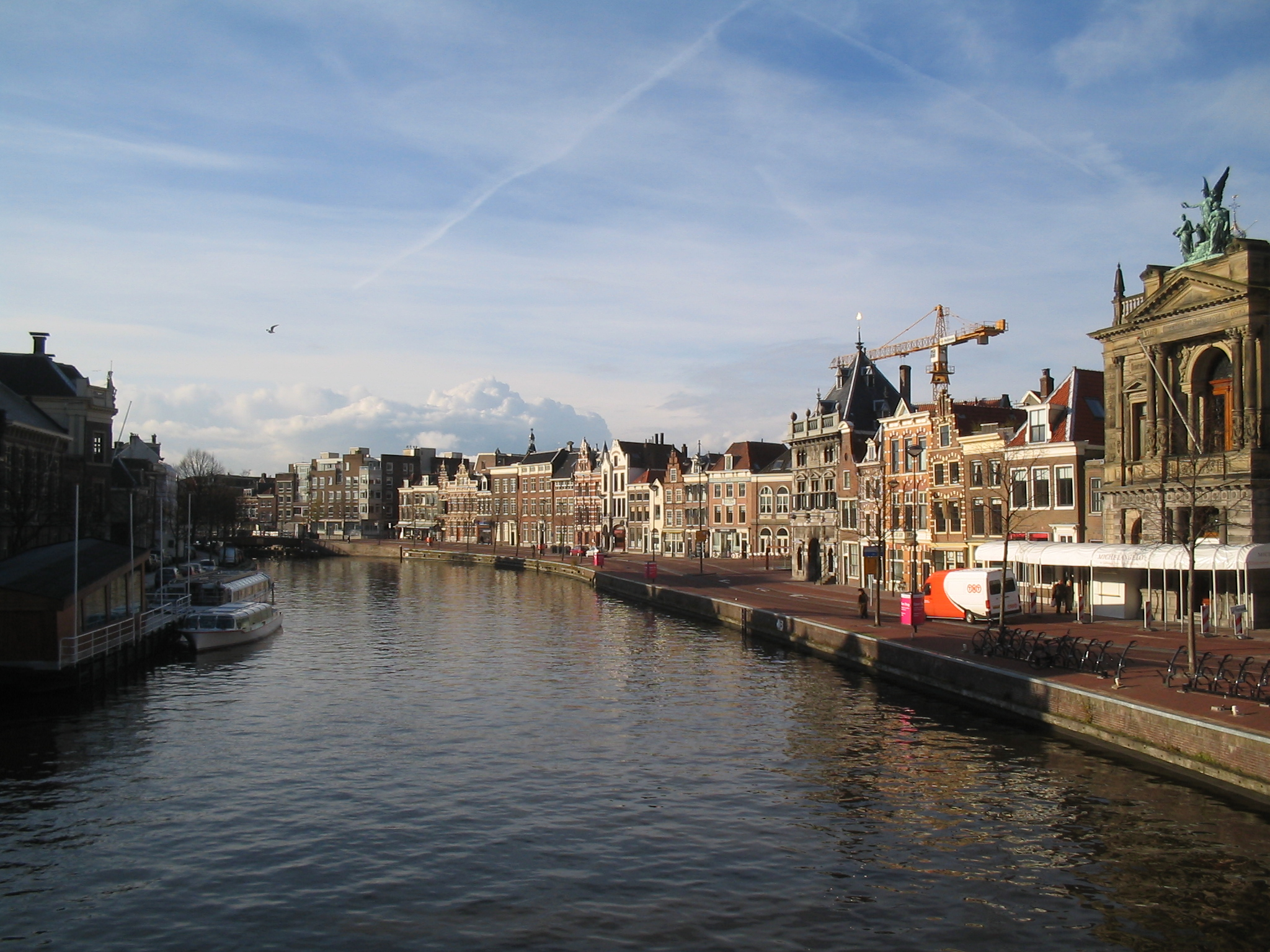 Spaarne, Haarlem, november 2005